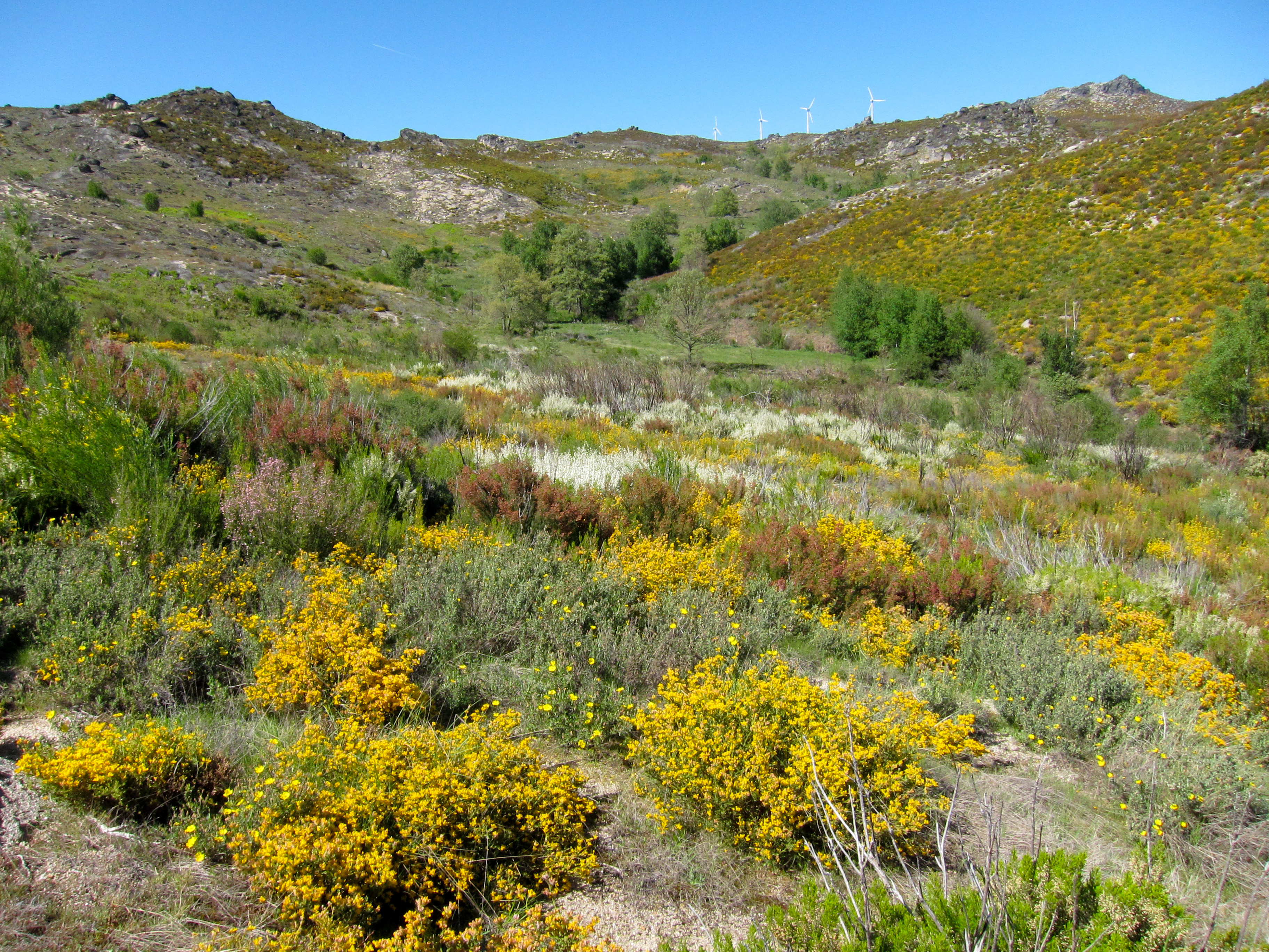 Parque Natural de Montesinho Porto Furado trail